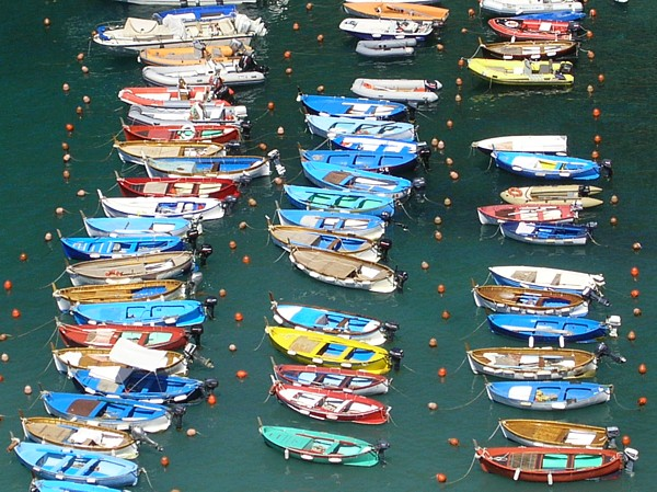 Cinque Terre: Vernazza (harbour) Picture taken by user:Idéfix, august 2005